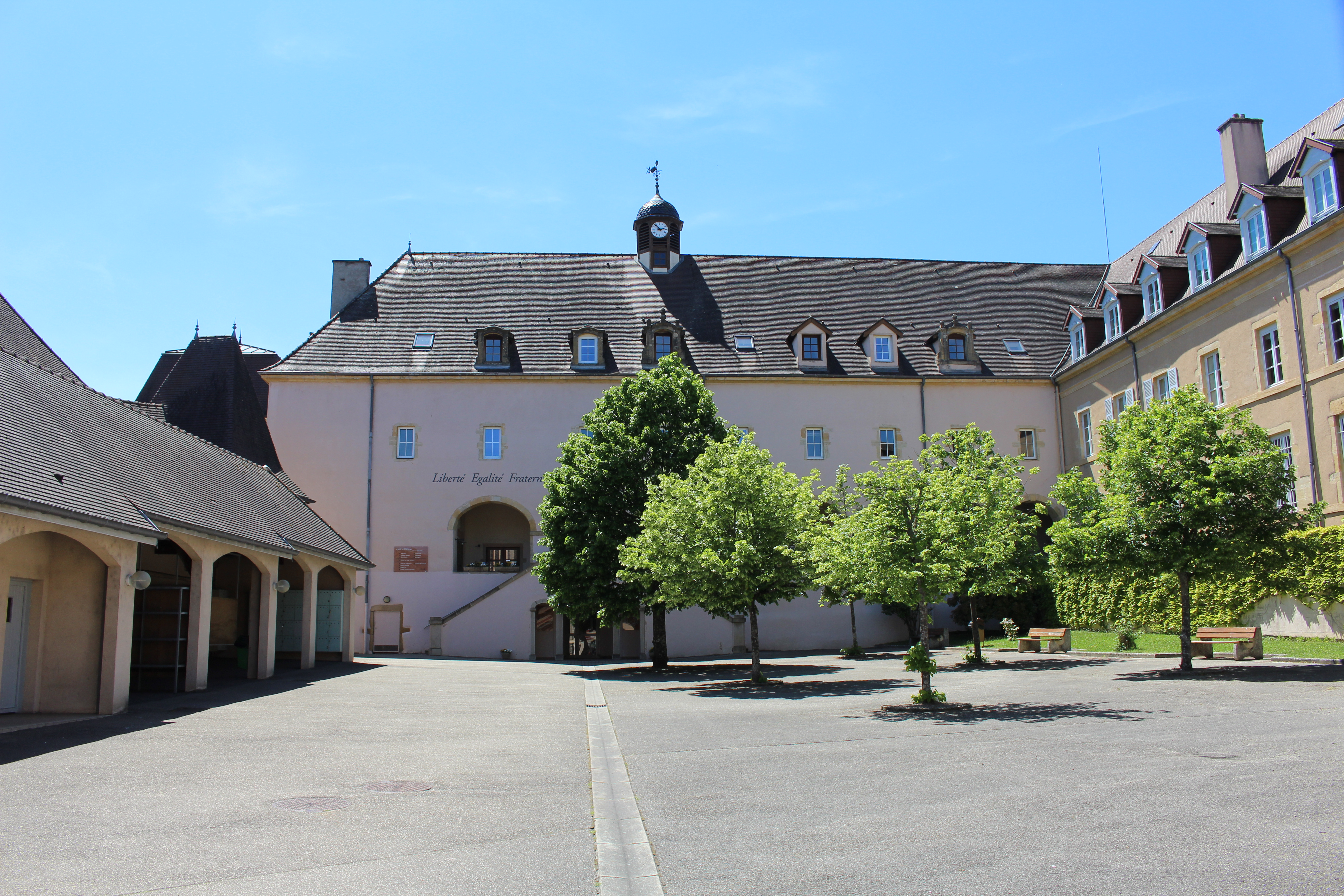 Site Champagny du Lycée Julien Wittmer, Charolles.